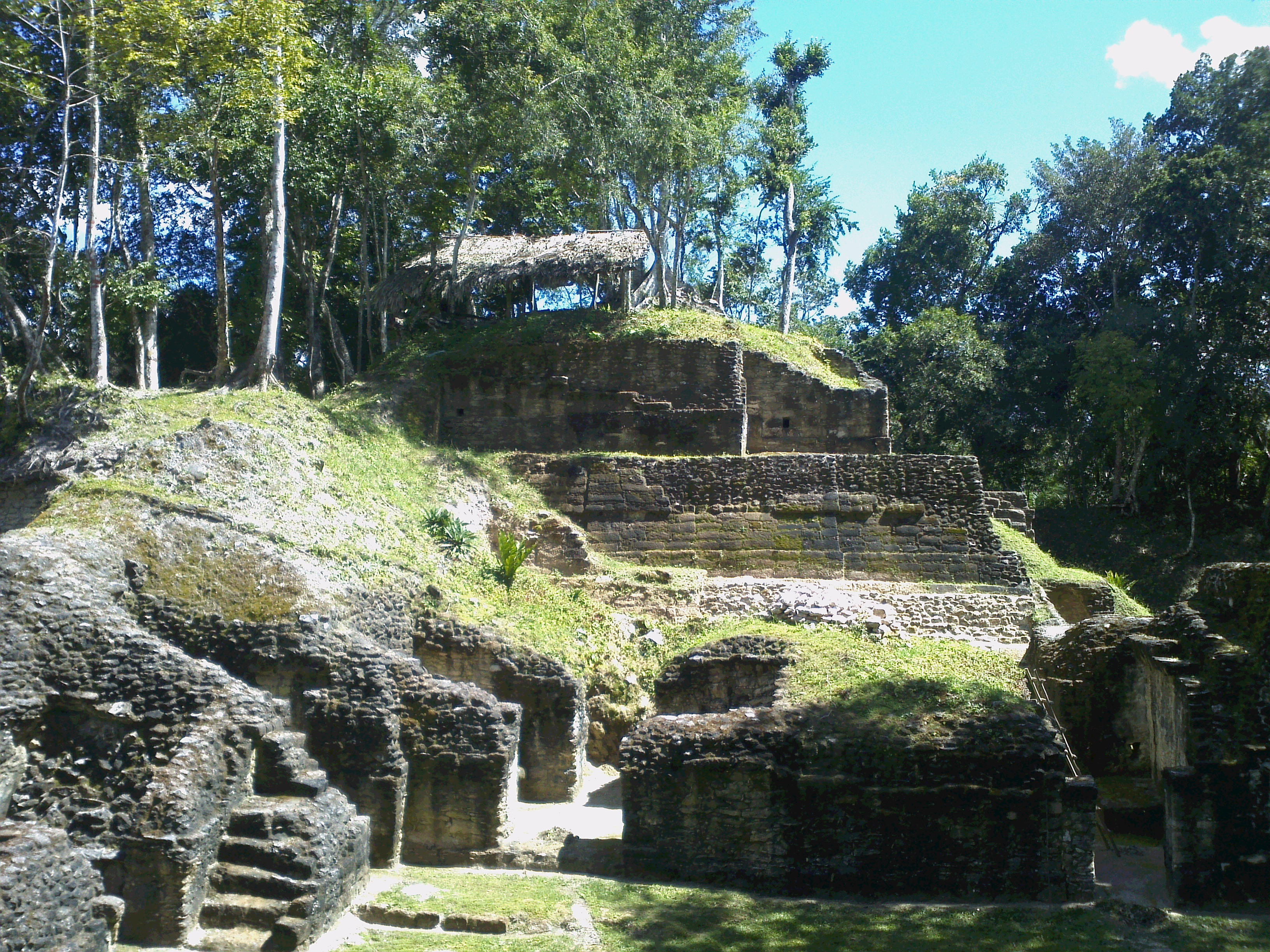 fotografia de las estructuras restauradas del sitio arqueologico el naranjo en melchor de mencos peten, Guatemala